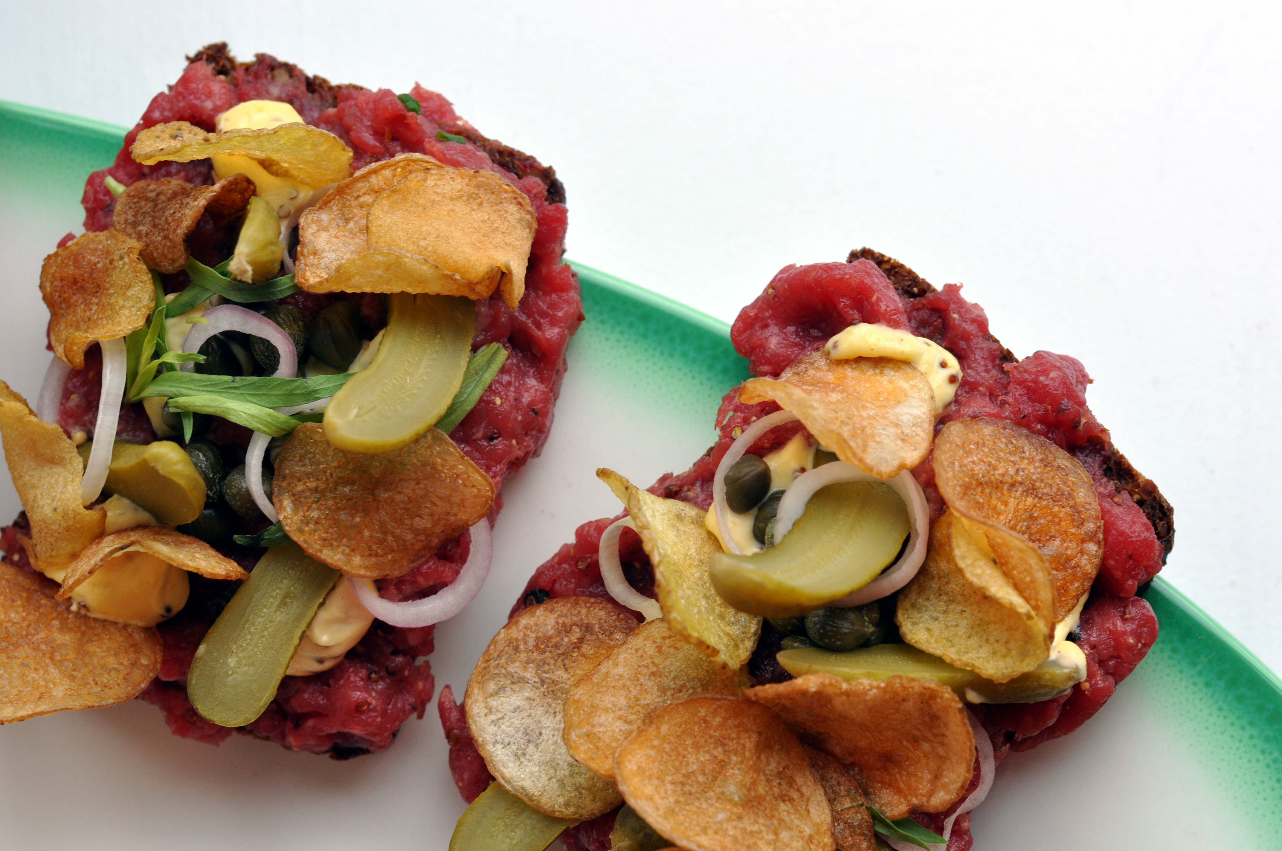 Smørrebrød med tatar